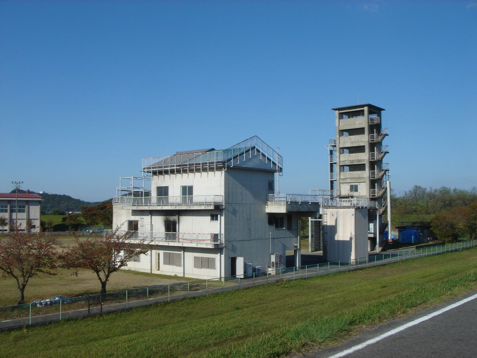 Gifu Fire Fighting Academy in Gifu Pref.（岐阜県消防学校の訓練塔）,Kakamigahara,Gifu,Japan(岐阜県各務原市)で撮影。